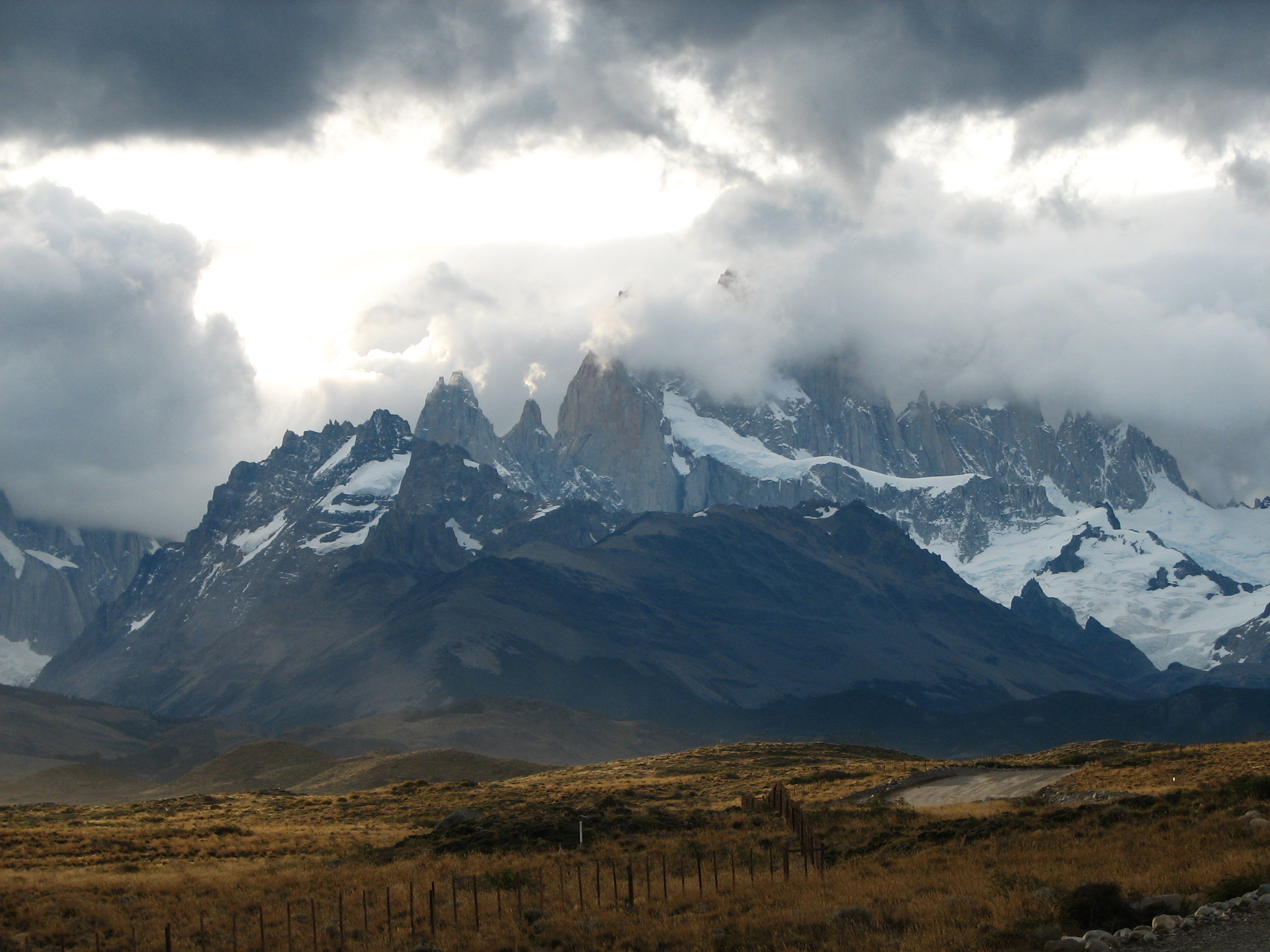 Andes, Argentina